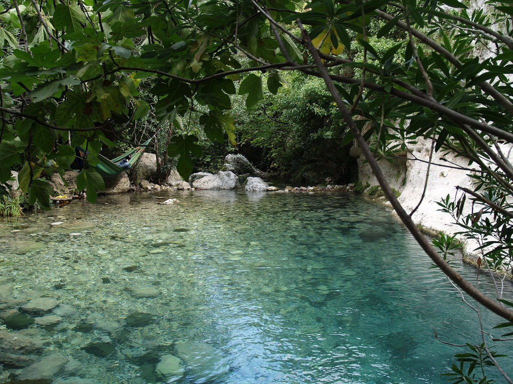 siracusa_cavagrande cassibile_5